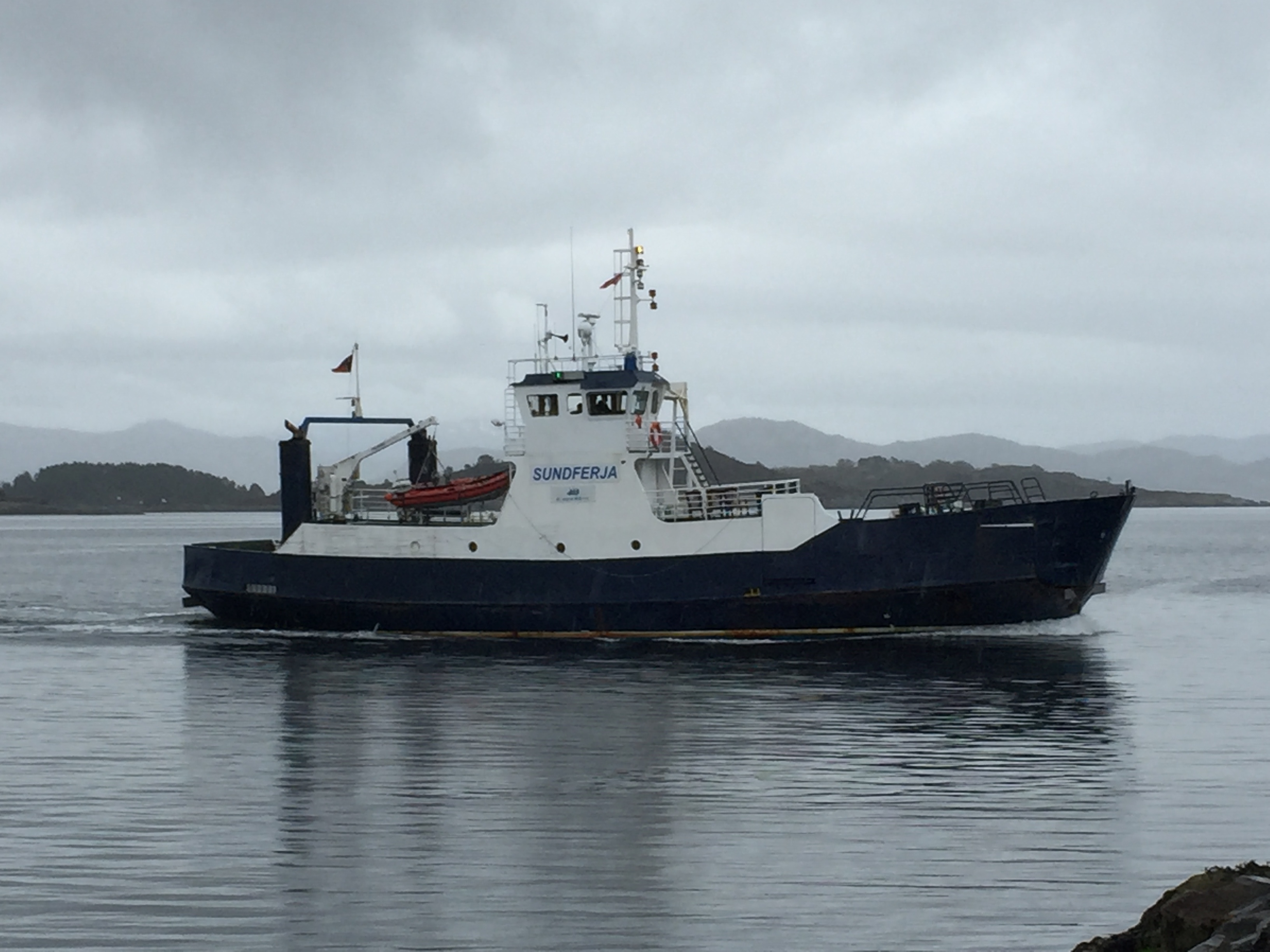 «Sundferja» i Lerøyosen